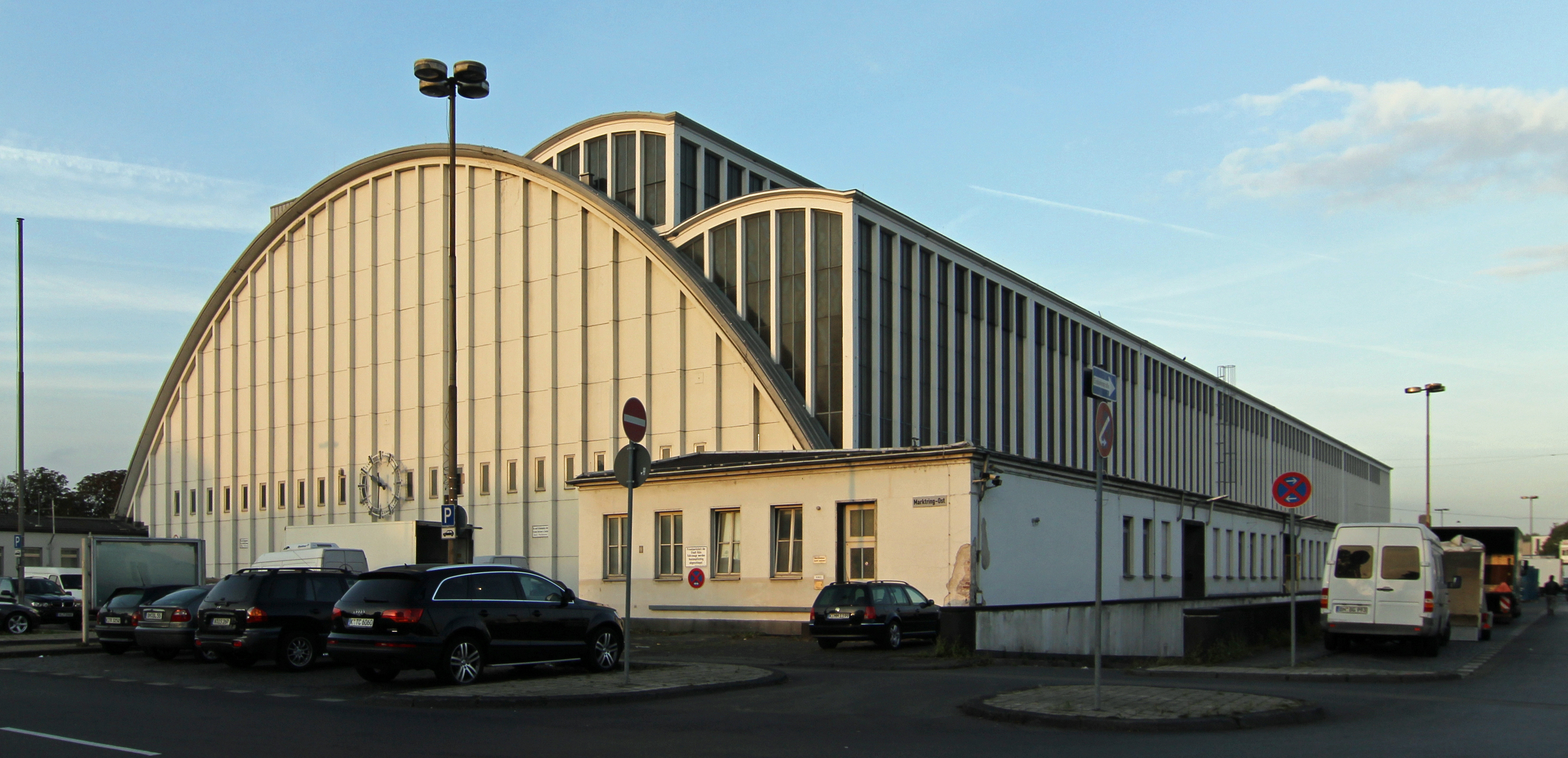 Großmarkthalle in Köln-RaderbergThis is a photograph of an architectural monument.